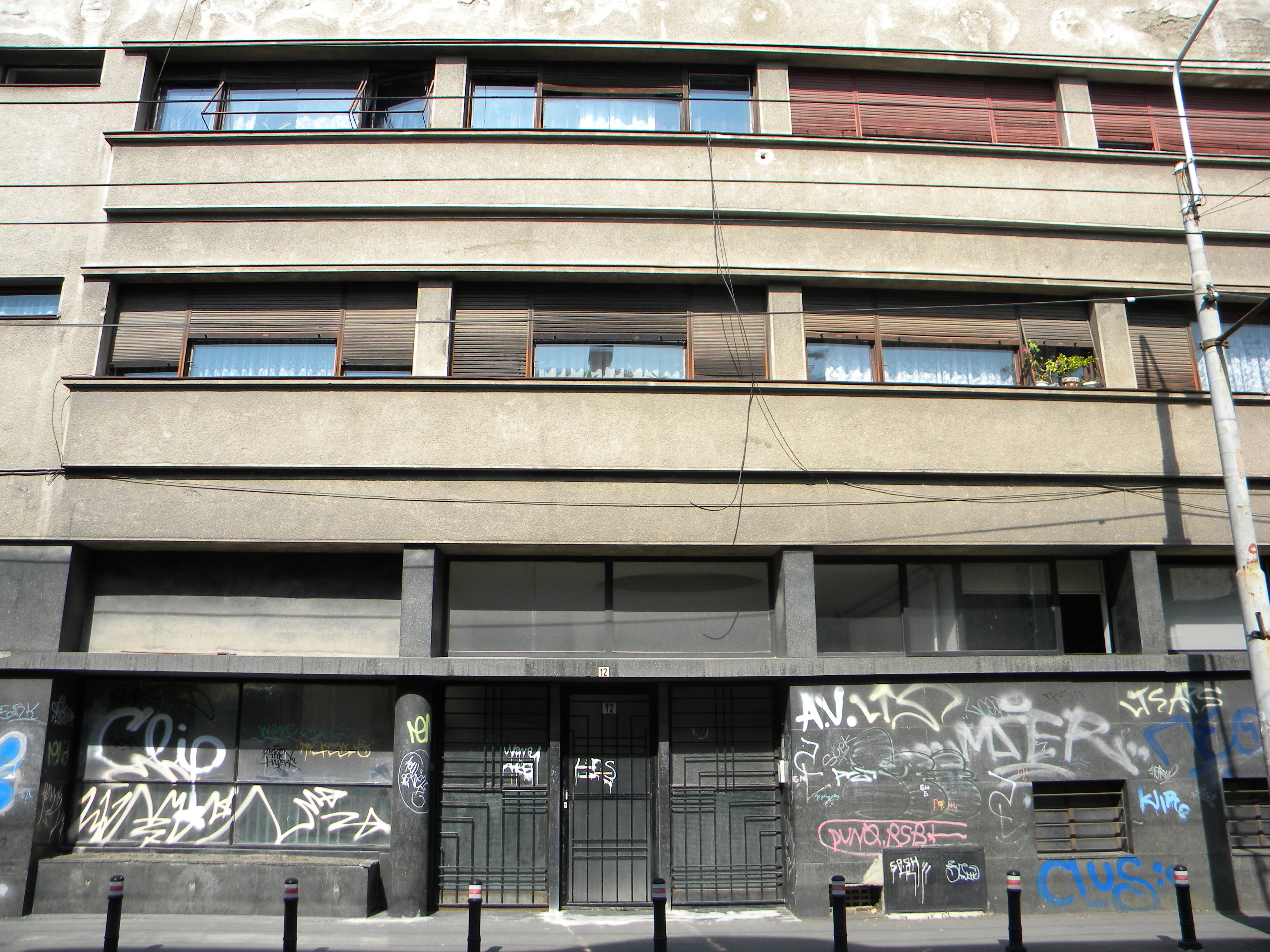 Bucuresti, Romania, Imobil de locuinte (Elena Ottulescu)pe Str. Gh. Manu nr. 12, sect. 1